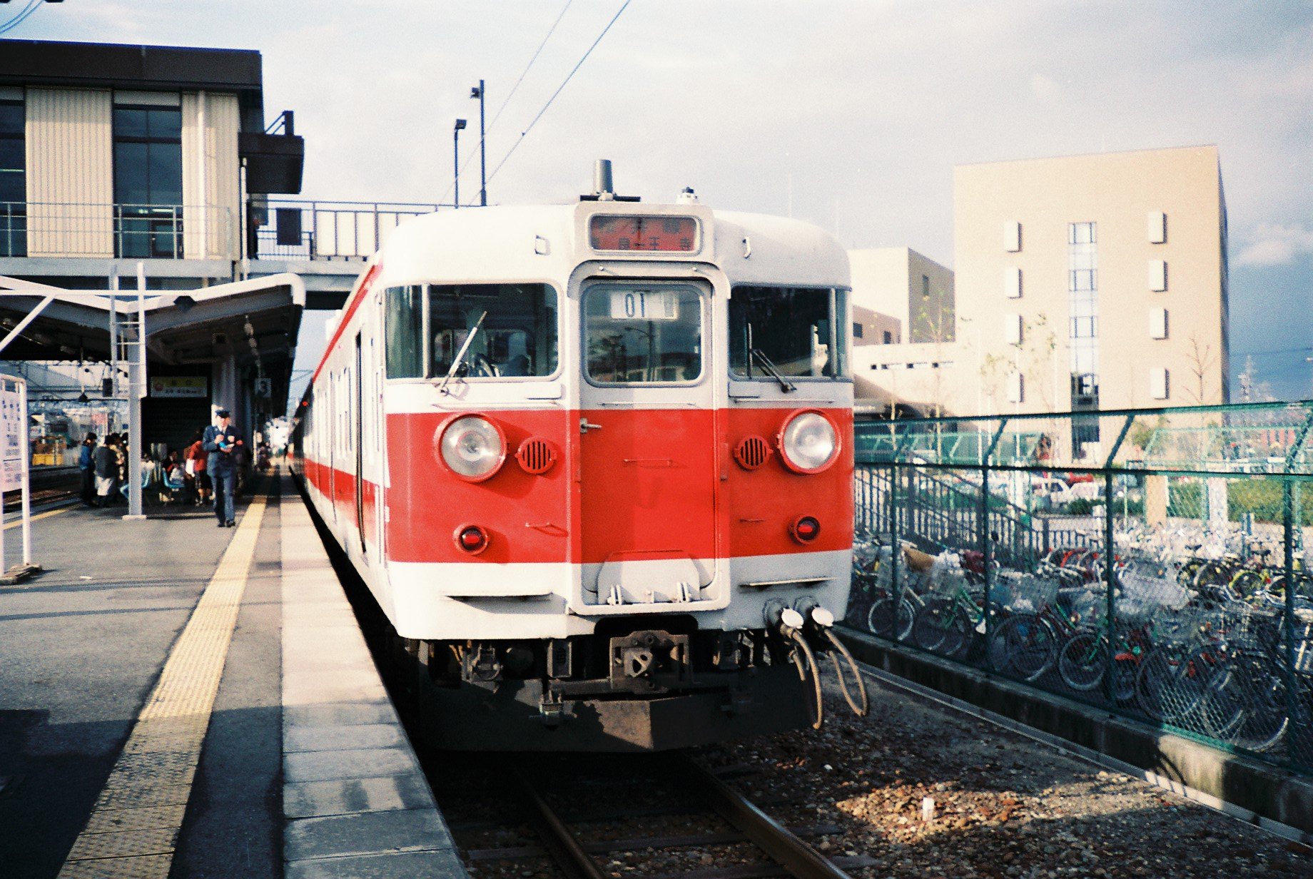 高田駅3番線に停車中の桜井線113系電車（関西線快速色、1987年1月撮影）